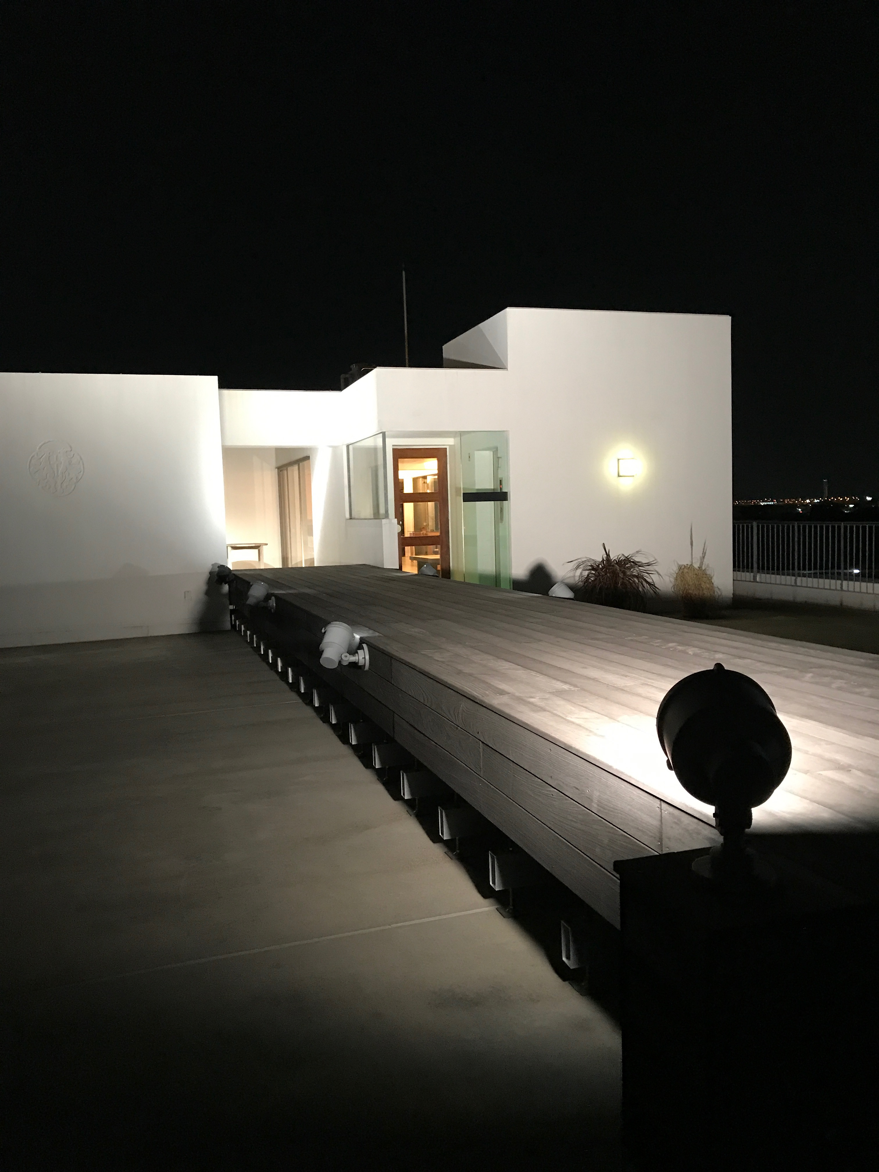 展示ギャラリー